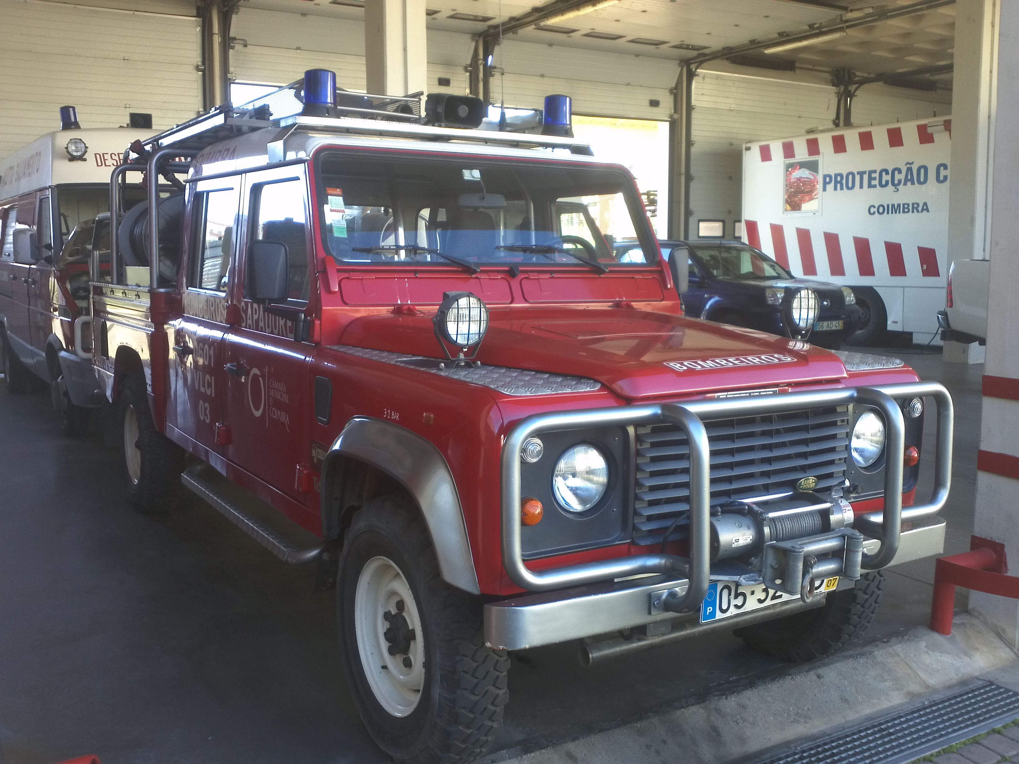 Veiculo Ligeiro de Combate a Incêndios 03